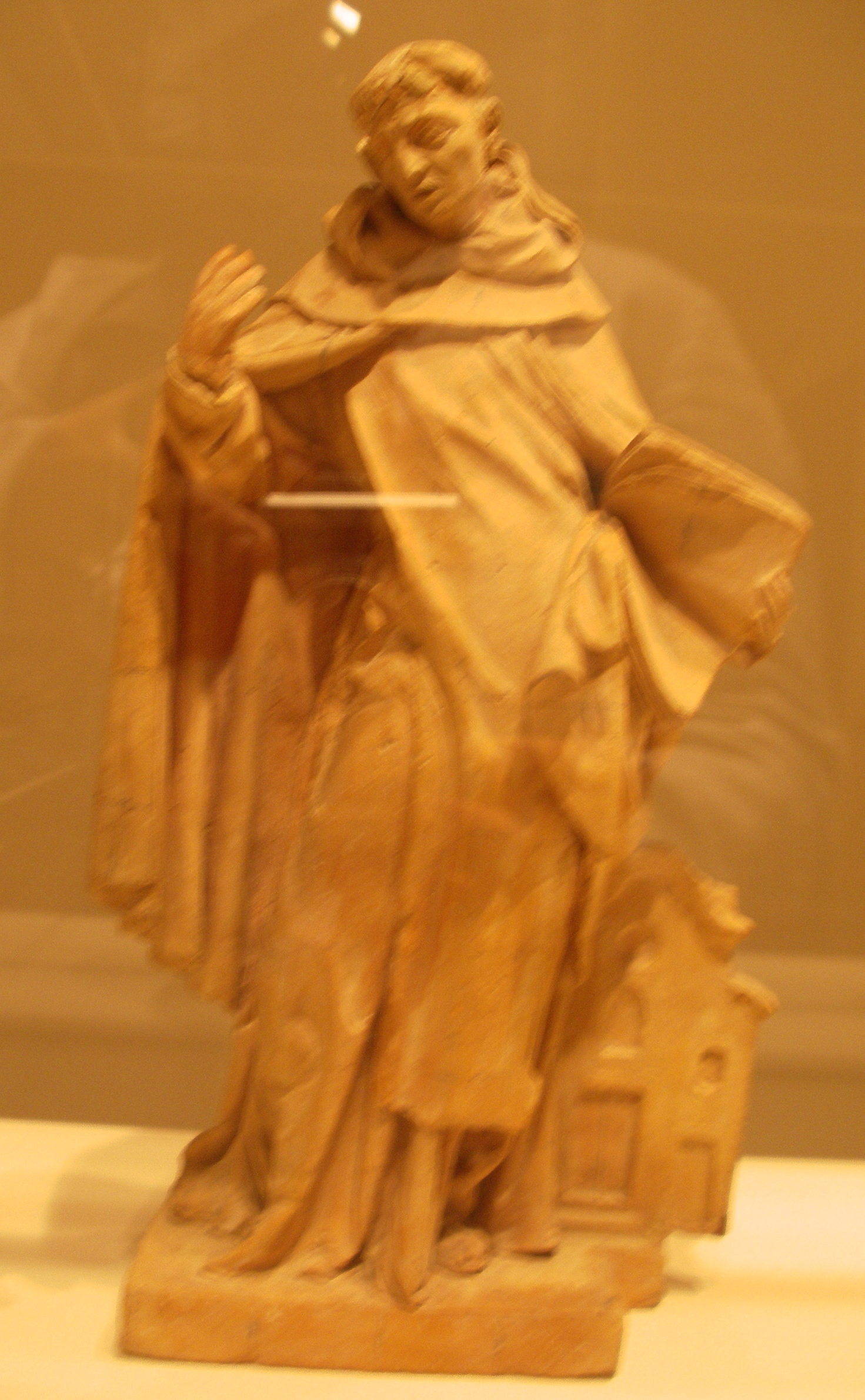 San Juan Bautista de la Concepción, escultura en terracota de Josep Gros, Museu Episcopal de Vic, final del s. XVIII